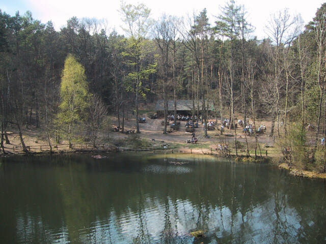 Ungeheuersee Autor: Hans Abel (Wanderhans) Datum: Sommer 2004 Beschreibung:'Wanderhütte am Ungeheuersee